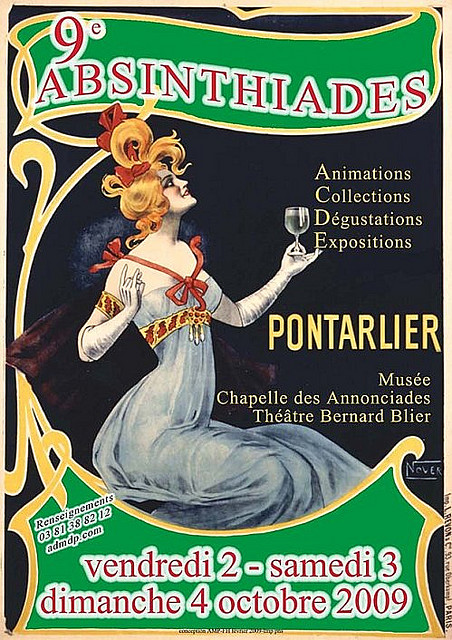 Les absinthiades sont l'occasion de rappeler que Pontarlier fut longtemps la capitale de l'absinthe puisqu'elle comptait plus de vingt distilleries il y a 100 ans. Chaque année collectionneurs passionnés venant de l'étranger et de la France entière ou néophytes se retrouvent début octobre pour se replonger dans l'ambiance de la mythique fée verte. Les participants peuvent échanger des objets (fontaines, cuillères à absinthe....), découvrir les ouvrages concernant ce sujet, participer au jury populaire de dégustation, assister à des conférences ou encore se divertir lors de la soirée cabaret du samedi soir. De leur côté les professionnels (producteurs du monde entier) se donnent rendez-vous pour un concours de plus en plus reconnus dans la profession. Les lauréats qu'ils soient britanniques, suisses ou allemands, n'hésitant pas à signaler les prix obtenus à Pontarlier sur les étiquettes de leurs produits. Manifestation Organisées par l'association "Les Amis du Musée de Pontarlier". Tél. : 03 81 38 82 12